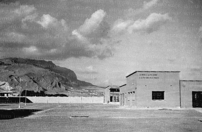 Aeroporto militare di Milo a Trapani, nel 1937